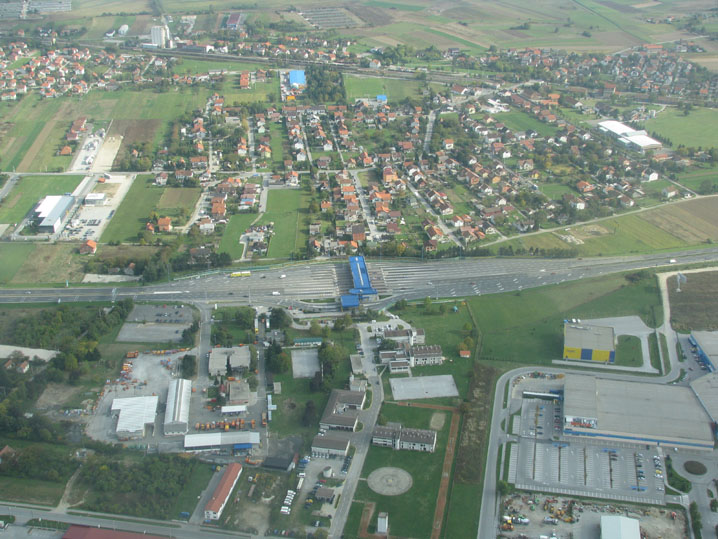 Naplatna postaja Lučko, na autocesti A1